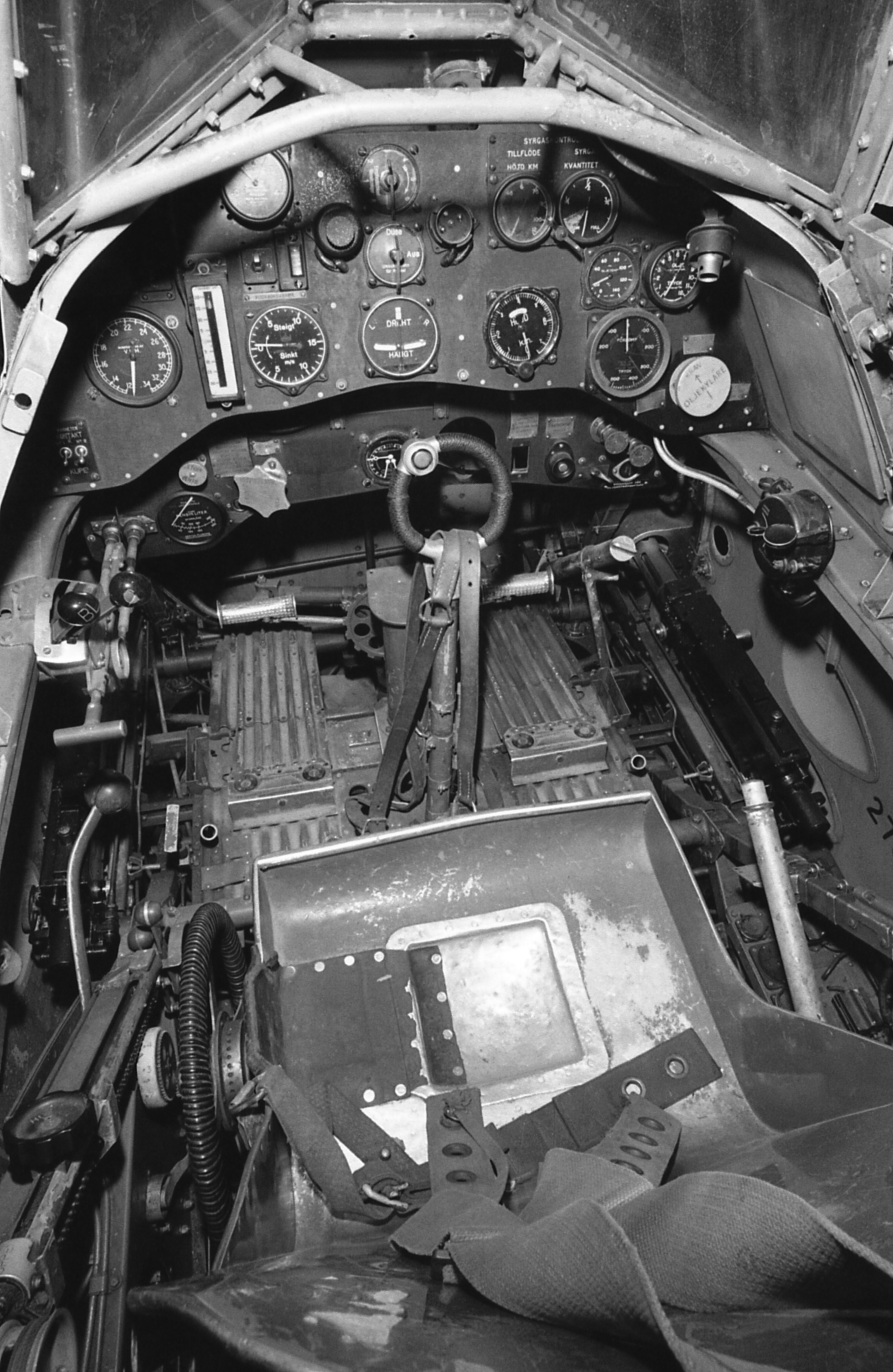 Gloster Gladiator cockpit.